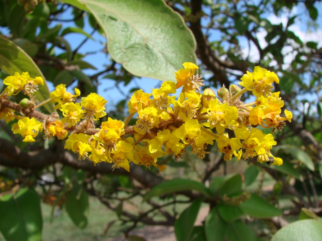 Byrsonima pachyphylla - MALPIGHIACEAE Parque Olhos D'Água - Brasília - Distrito Federal - Brasil.